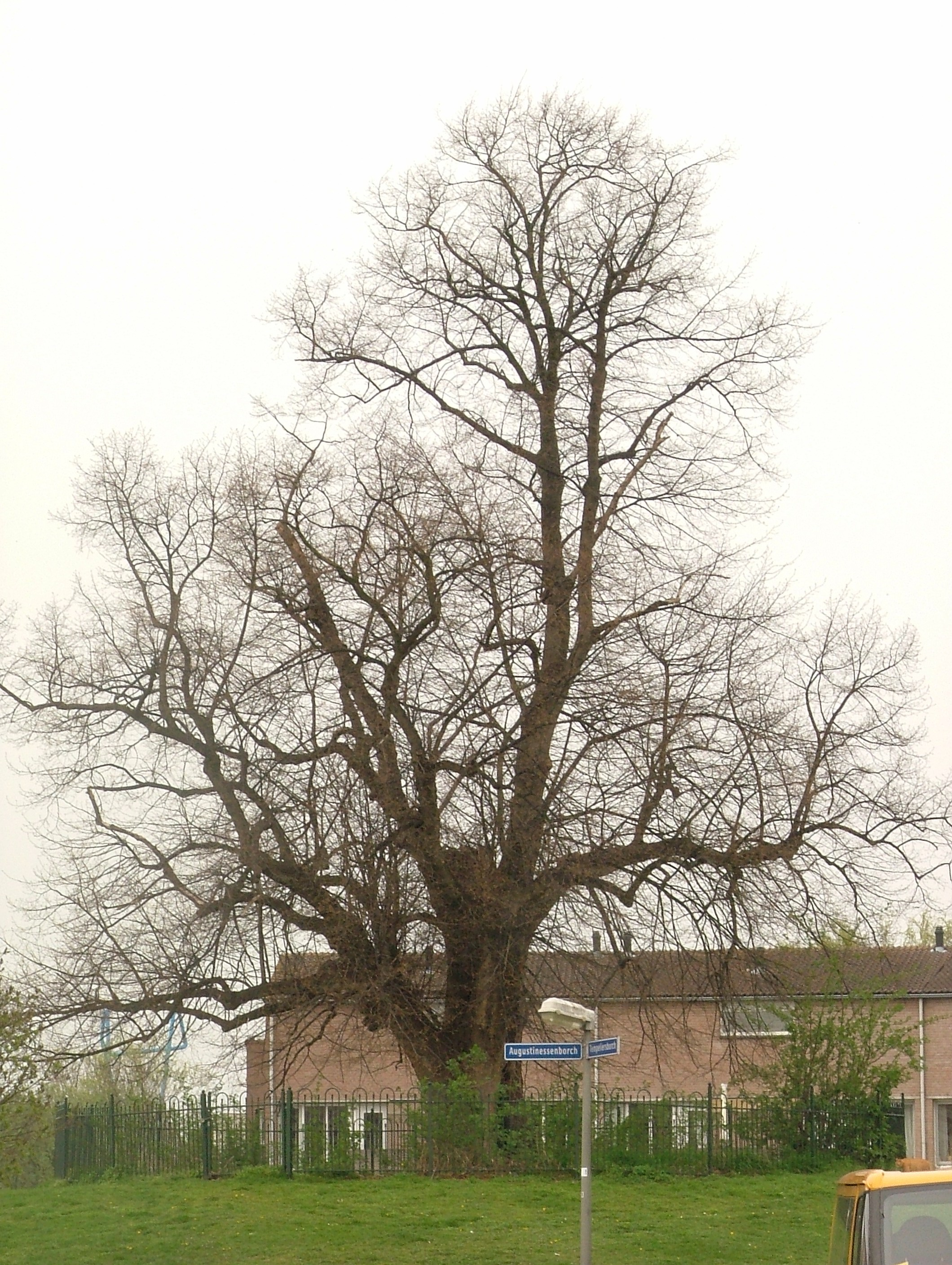 Eigen werk Geert C. Smulders, Rosmalen Categorie:Afbeelding Rosmalen Categorie:Wikipedia:Afbeeldingen/Gebruiker:Hsf-toshiba